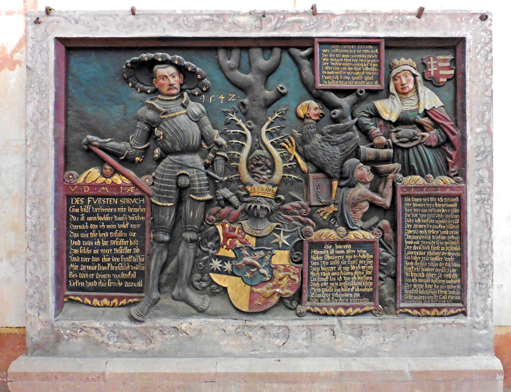 Der Philippstein zeigt Landgraf Philipp den Großmütigen (links), welcher als Anhänger der Reformation die hessischen Klöster auflöste und in Hospitäler umwandelte nach dem Vorbild seiner Ahnfrau Elisabeth von Thüringen (rechts). Das Mönchtum wird als habgierige Harpyie dargestellt. Es befindet sich heute in der Kirche des ehemaligen Zisterzienserklosters in Haina in Hessen. Ansicht von N. Des Fürsten Spruch: V·D·M·I·Æ· [Verbum Domini Manet in Aeternum] DES FVRSTEN SPRVCH Gott hilff verbreiten mir dein eher Das ist mein hochster winsch und gheir Darnach das ich mein volck regir Das wir alle beid gefallen dir Und was ich hye gestifftet hab Das solchs nit wert (wird) gestellet ab Und wer das thut den straff dein Hand Mit Armut Kranckheit Schmach und Schand Bis das er deinen Wolgefall Erken und thu sprecht Amen all